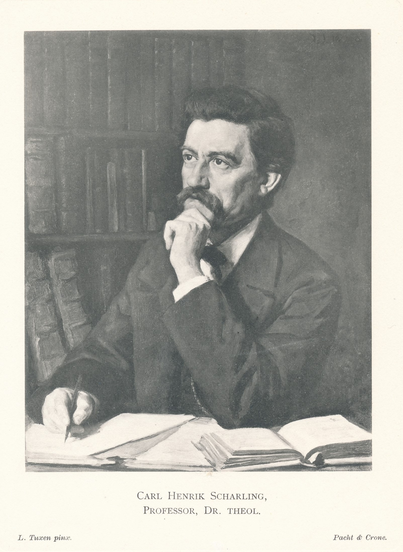 L. Tuxen pinx.1875--81 H. 70,5 B. 55 cm. Knæstykke. Halv profil.